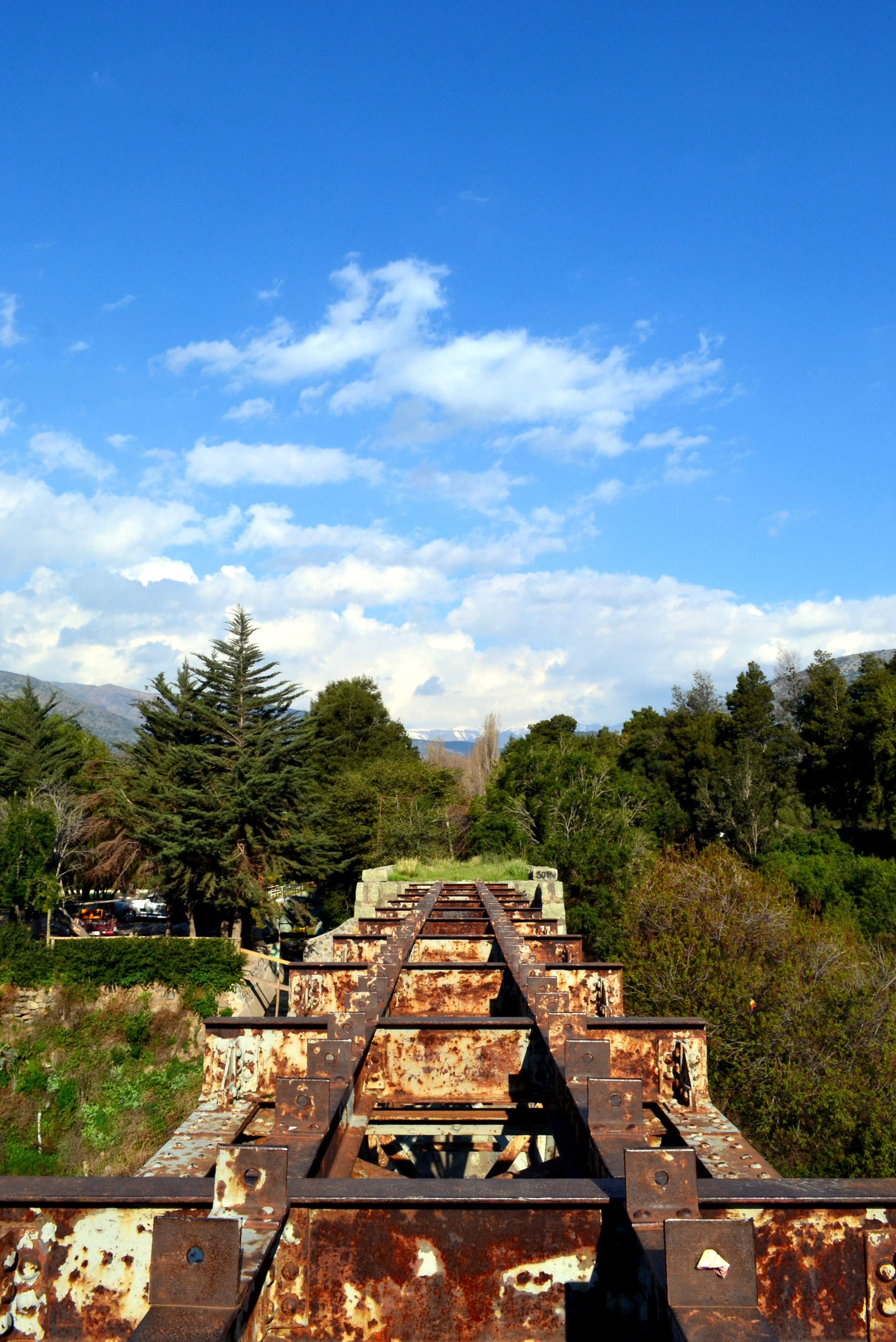 Construcciones existentes a lo largo del trazado del Ferrocarril de Puente Alto a El Volcán. This is a photo of a national monument in Chile: 881